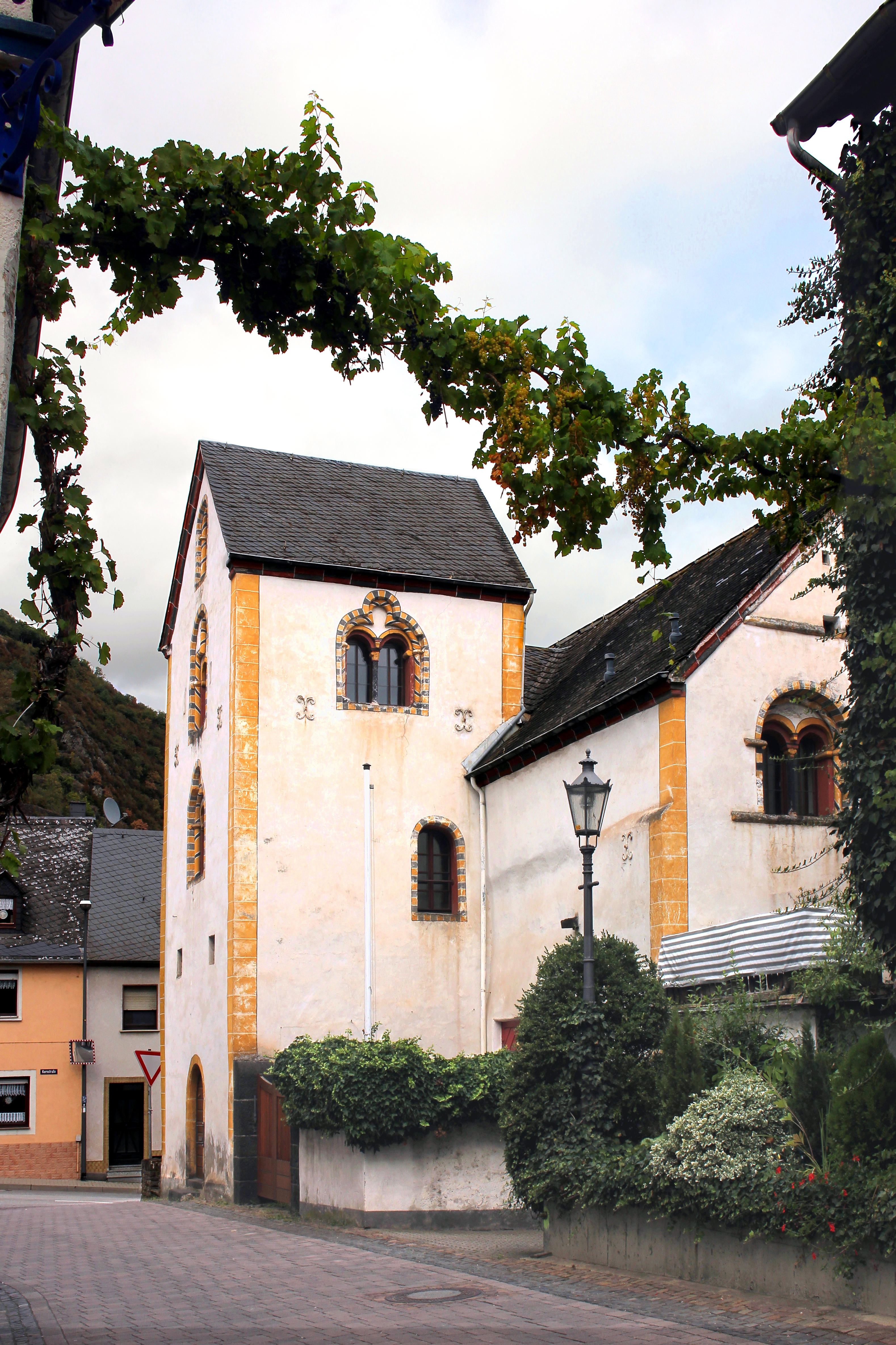 Haus „Korbisch“ in Treis-Karden, ehemaliges Propsteigebäude aus dem frühen 13. Jahrhundert. Der Name bezieht sich auf die Chorbischöfe, die in dem Haus in der Nähe der Stiftskirche St. Castor in Karden wohnten